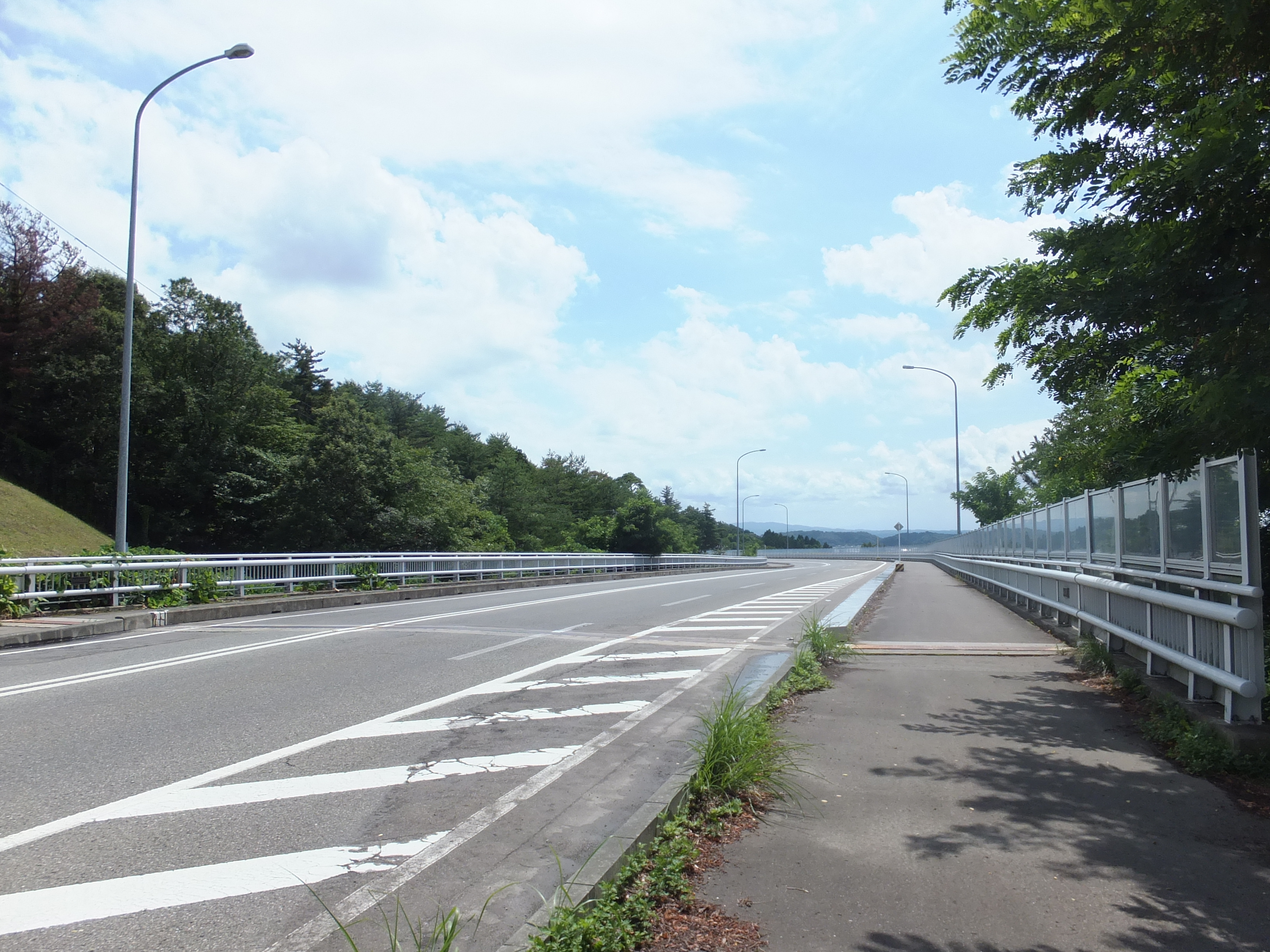 秋田県道41号秋田昭和線（横山金足線）手形山大橋